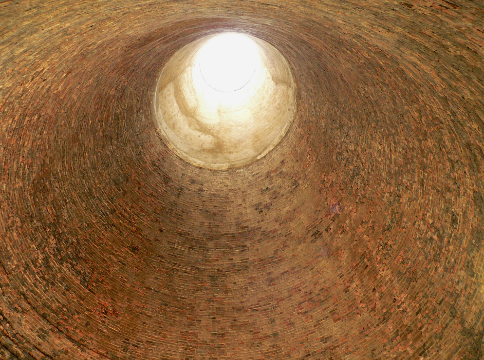 Glashütte Gernheim Glashüttenturm innen